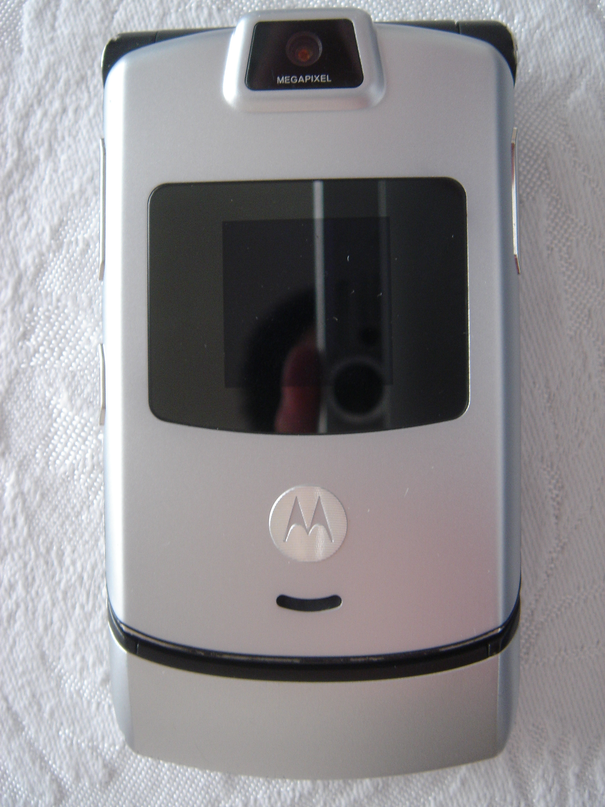 Motorola Razr V2 cellphone